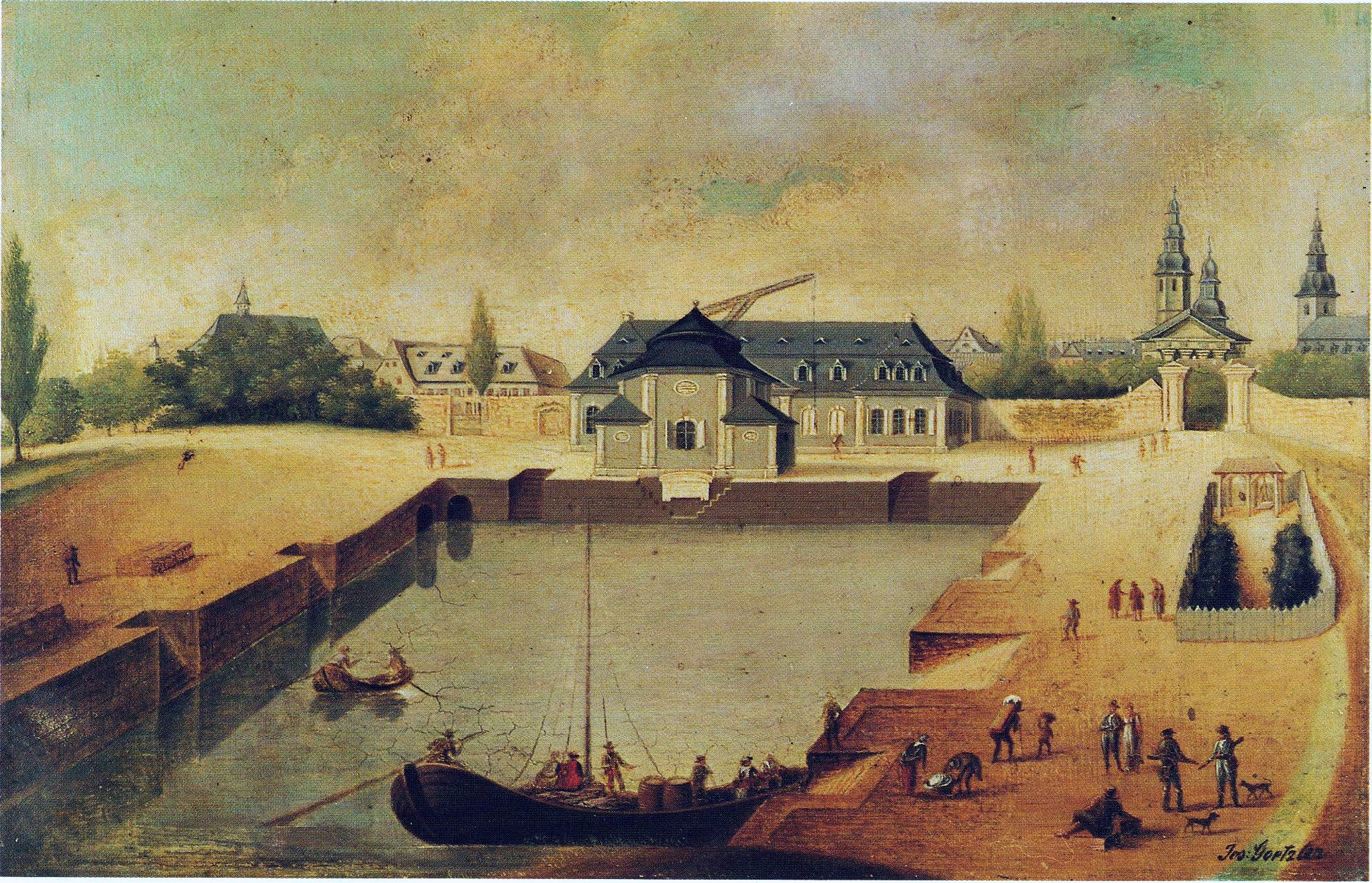 Frankenthal Hafenbecken des Kanals, um 1830